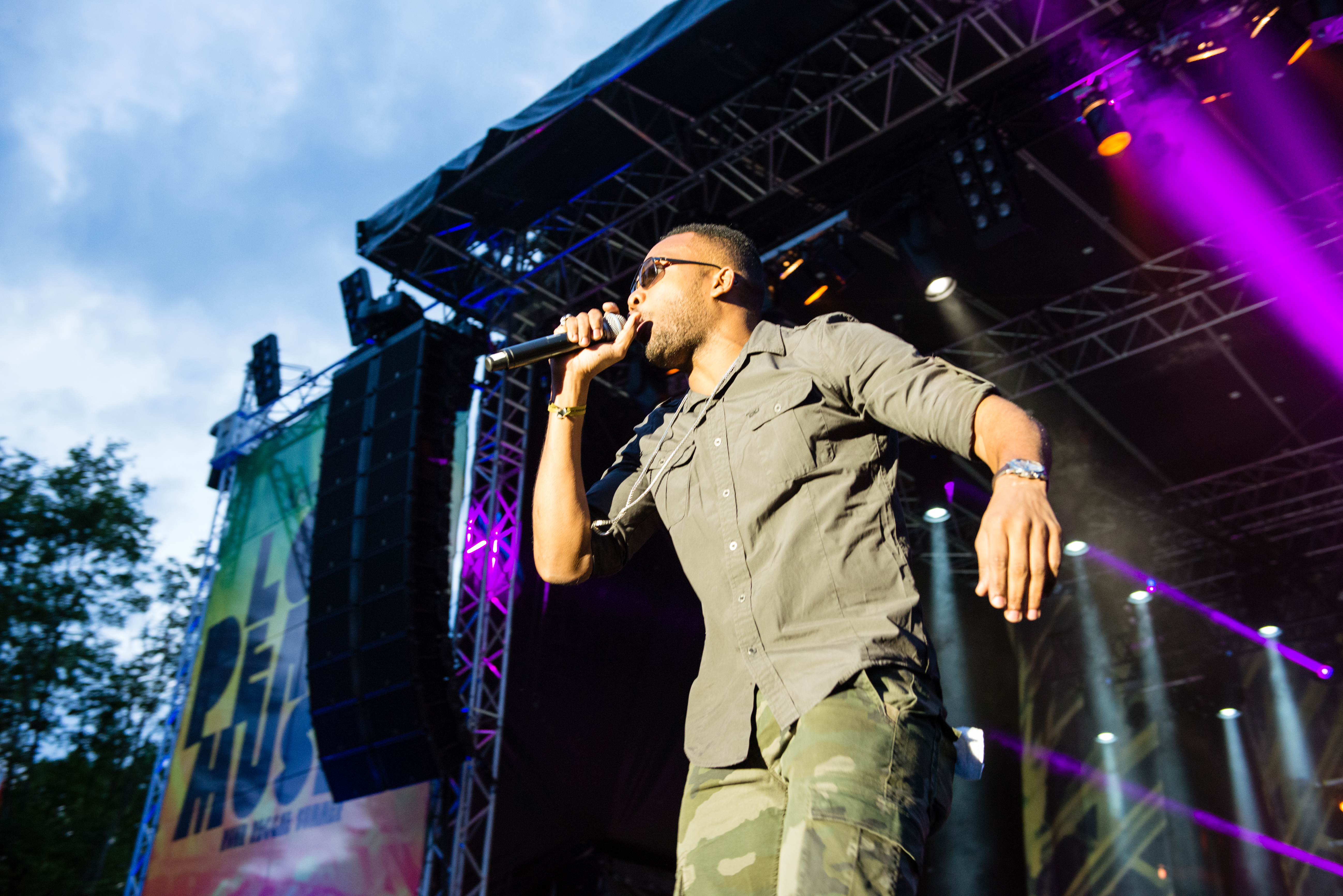 'Ruhr Reggae Summer 2014 - Dortmund': 'Agent Sasco'